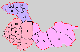 熊本県下益城郡の町村制時点の町村。